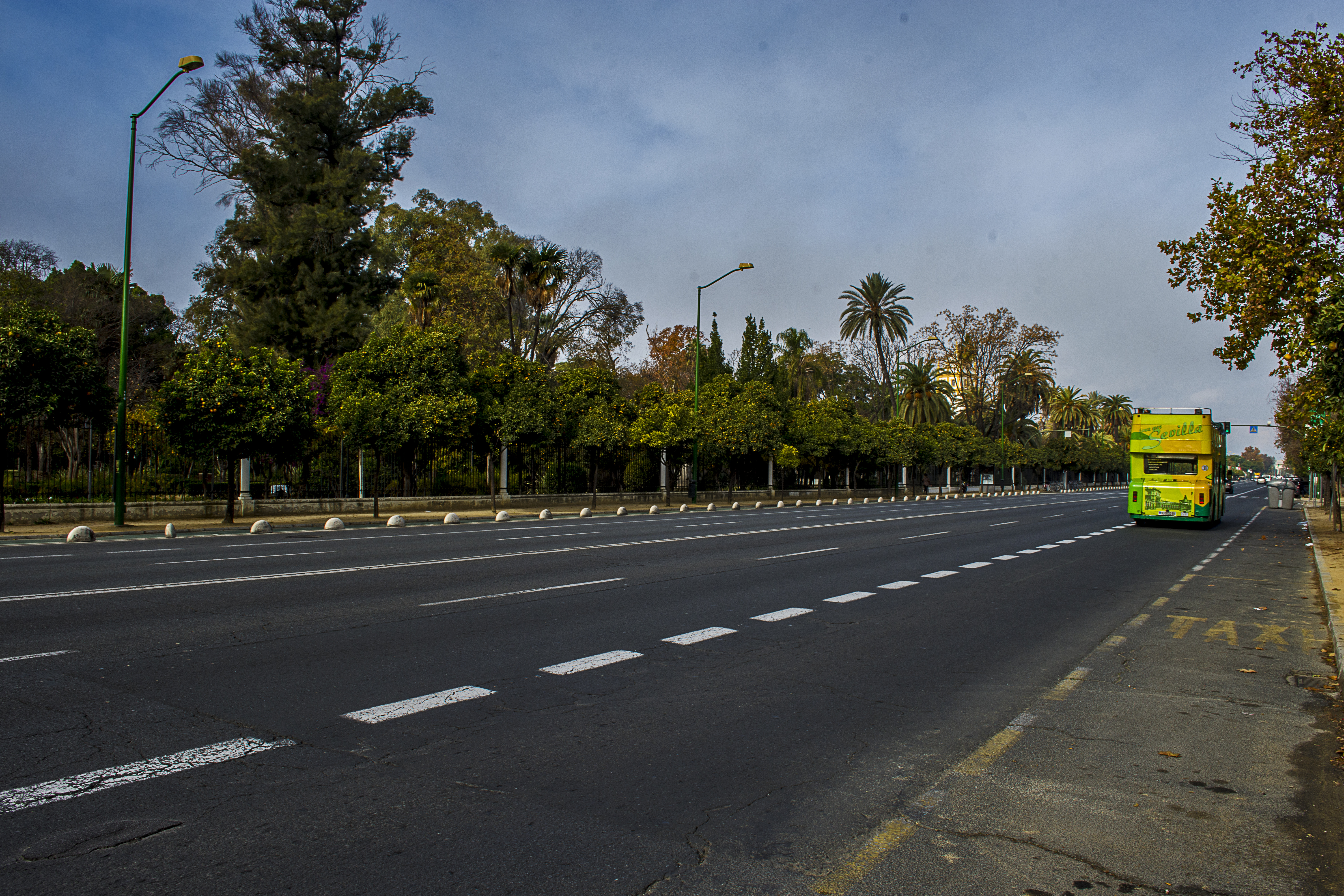 Paseo de las Delicias (Sevilla)